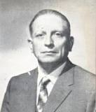 Fotografia de Alberto Trueba Urbina